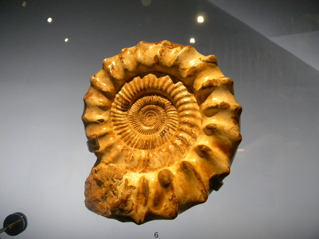 Perisphinctes en Kunfluejoj muzeo de Liono